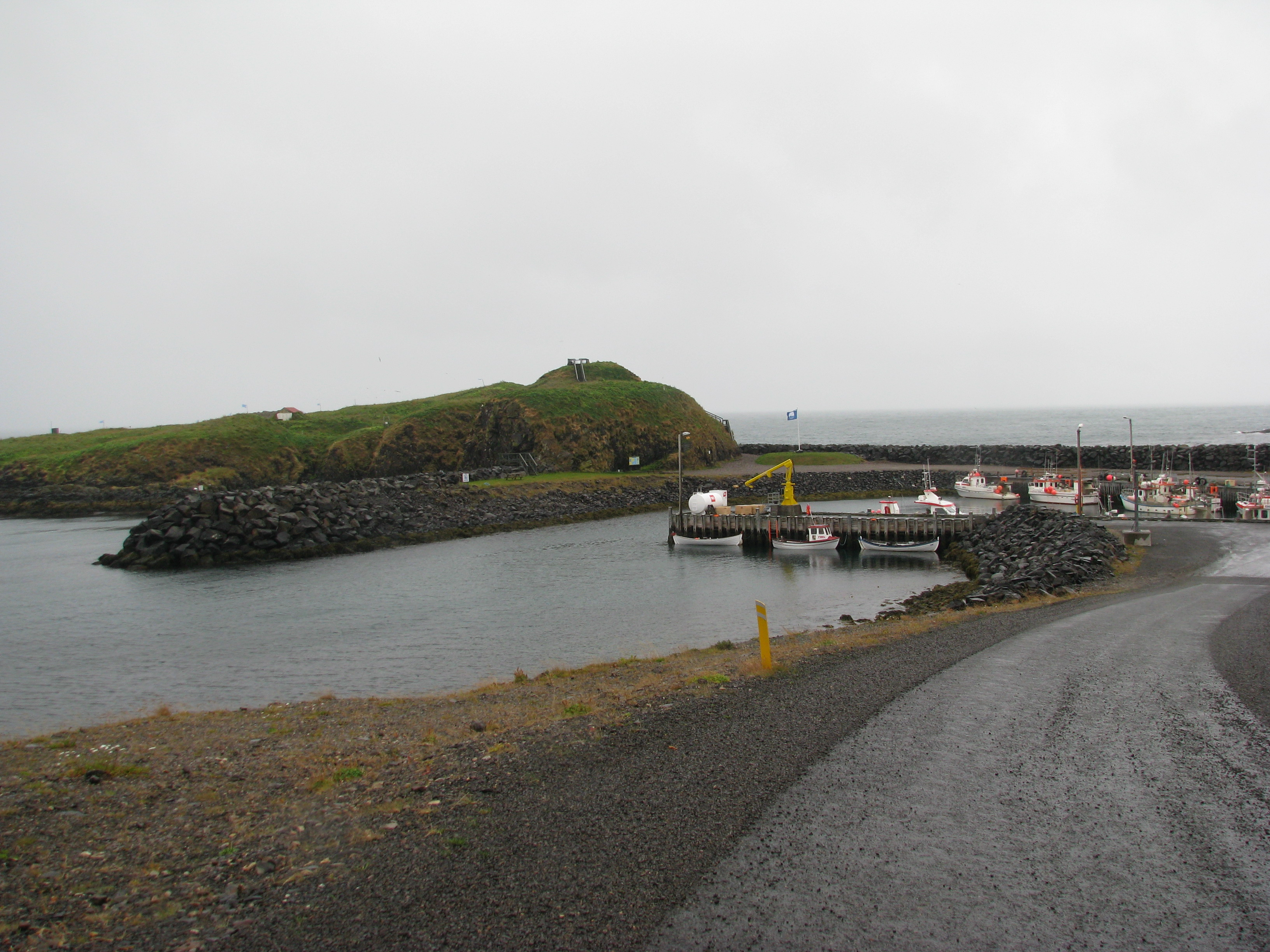 Harbour of BAkkagerði, Iceland